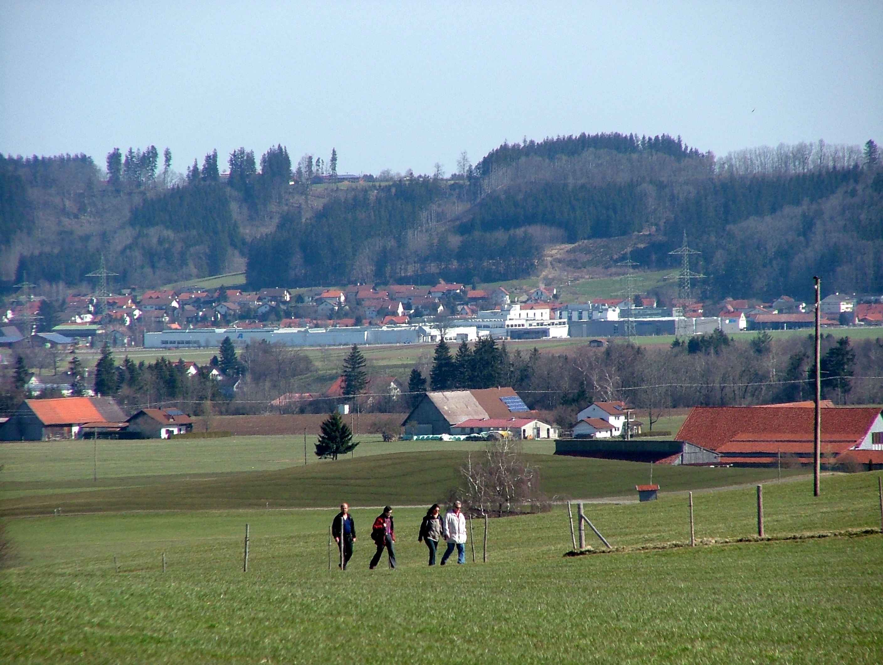 Wanderung bei Ziegelberg, im Hintergrund Wolfertschwenden